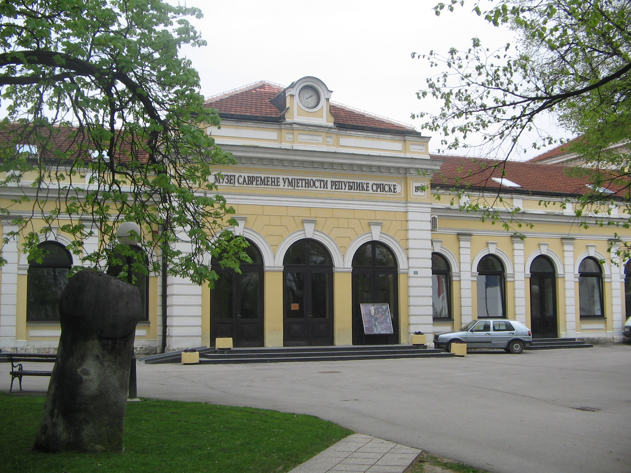 Музеј_савремене_умјетности_Републике_Српске